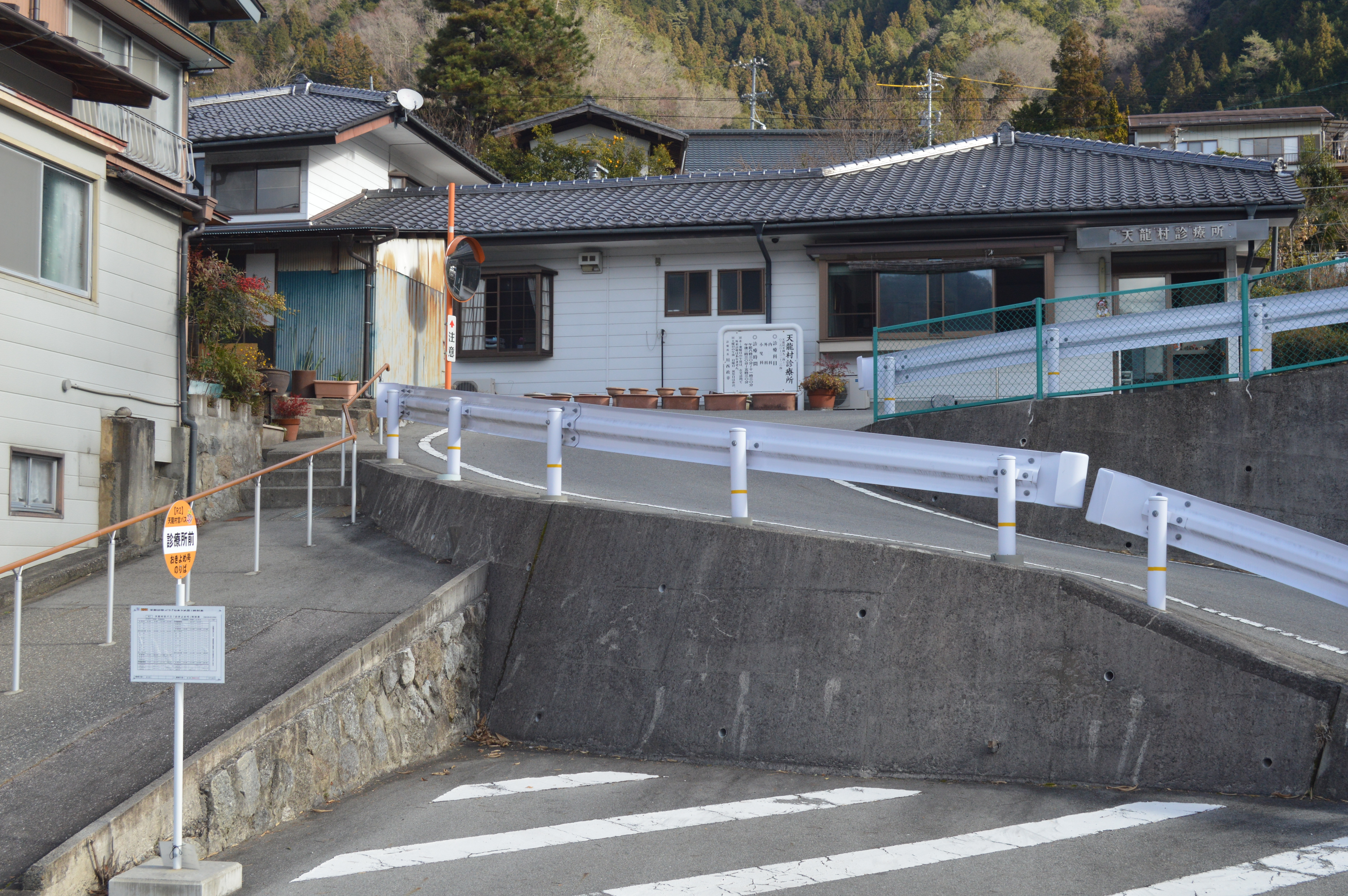 長野県下伊那郡天龍村の天龍村診療所。